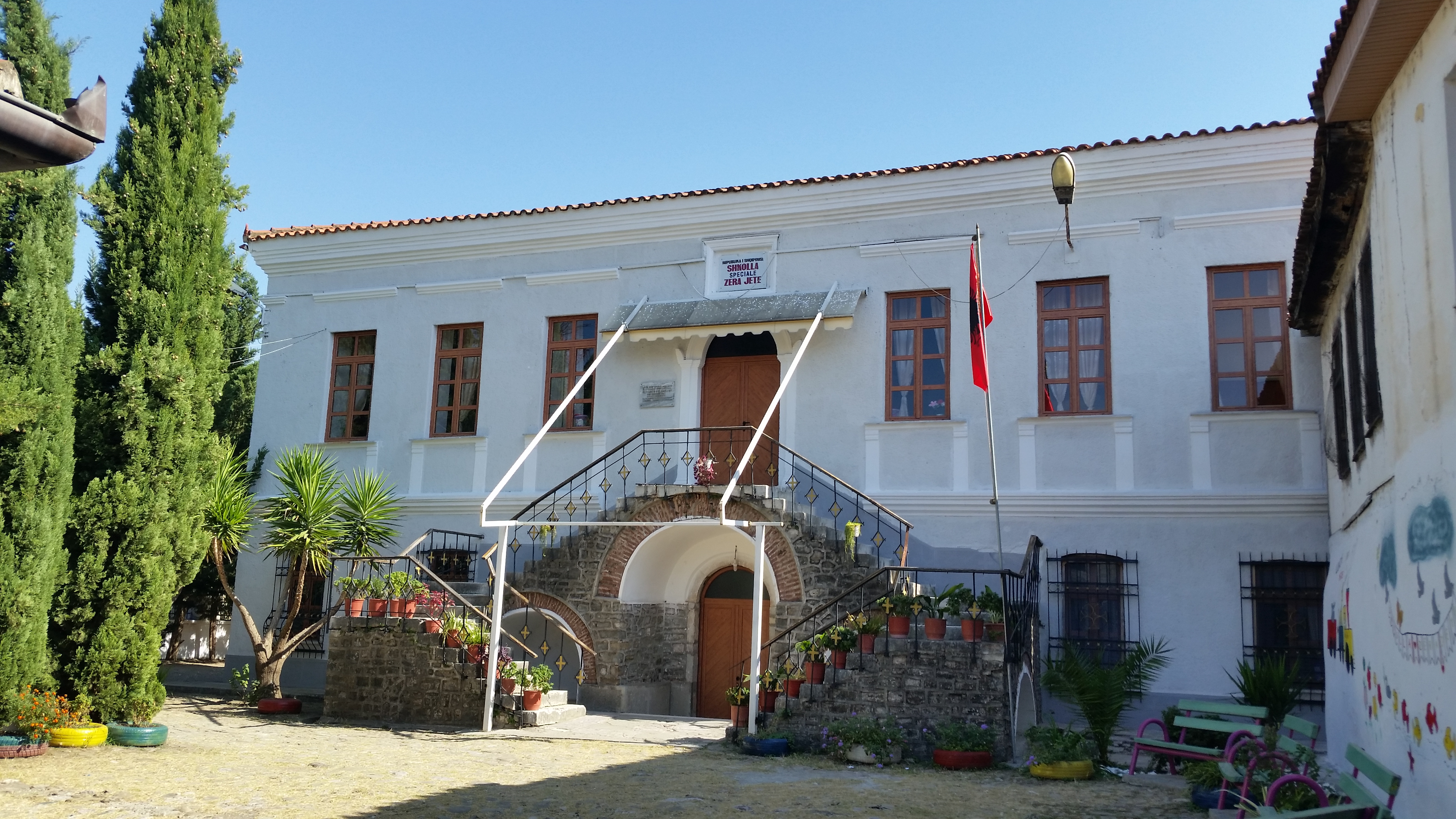 Ndërtesa ku u mbajtë Kongresi i Elbasanit nga data 2-9 shtator 1909. Ky kongres vendosi hapjen e shkollës së parë normale në Elbasan.